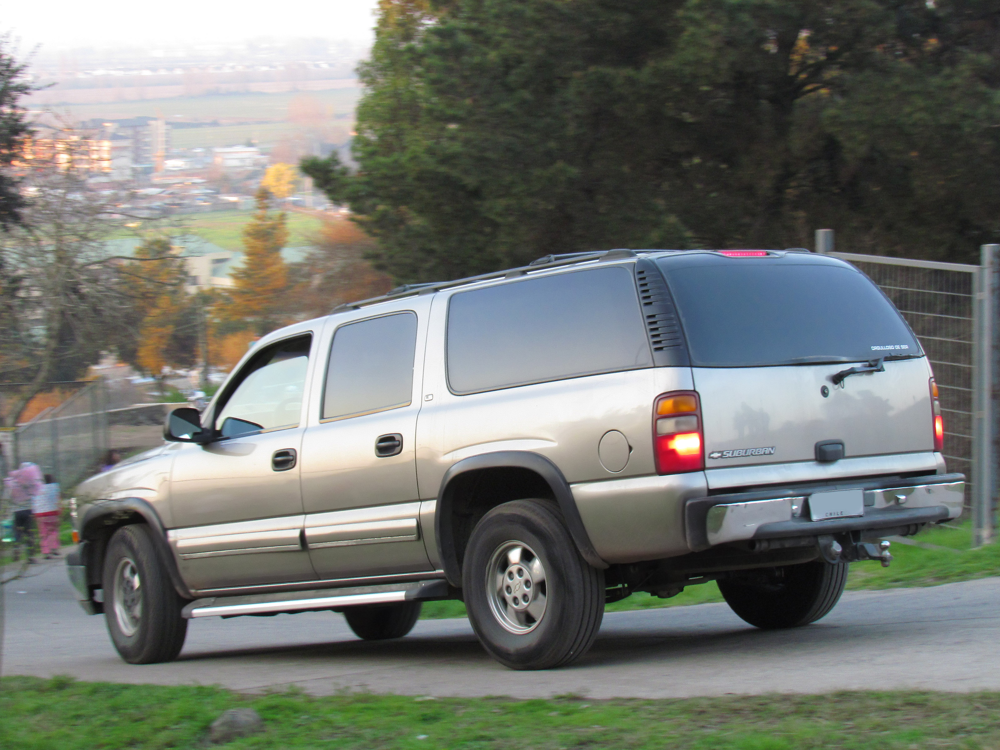 Chevrolet Suburban LS 2002